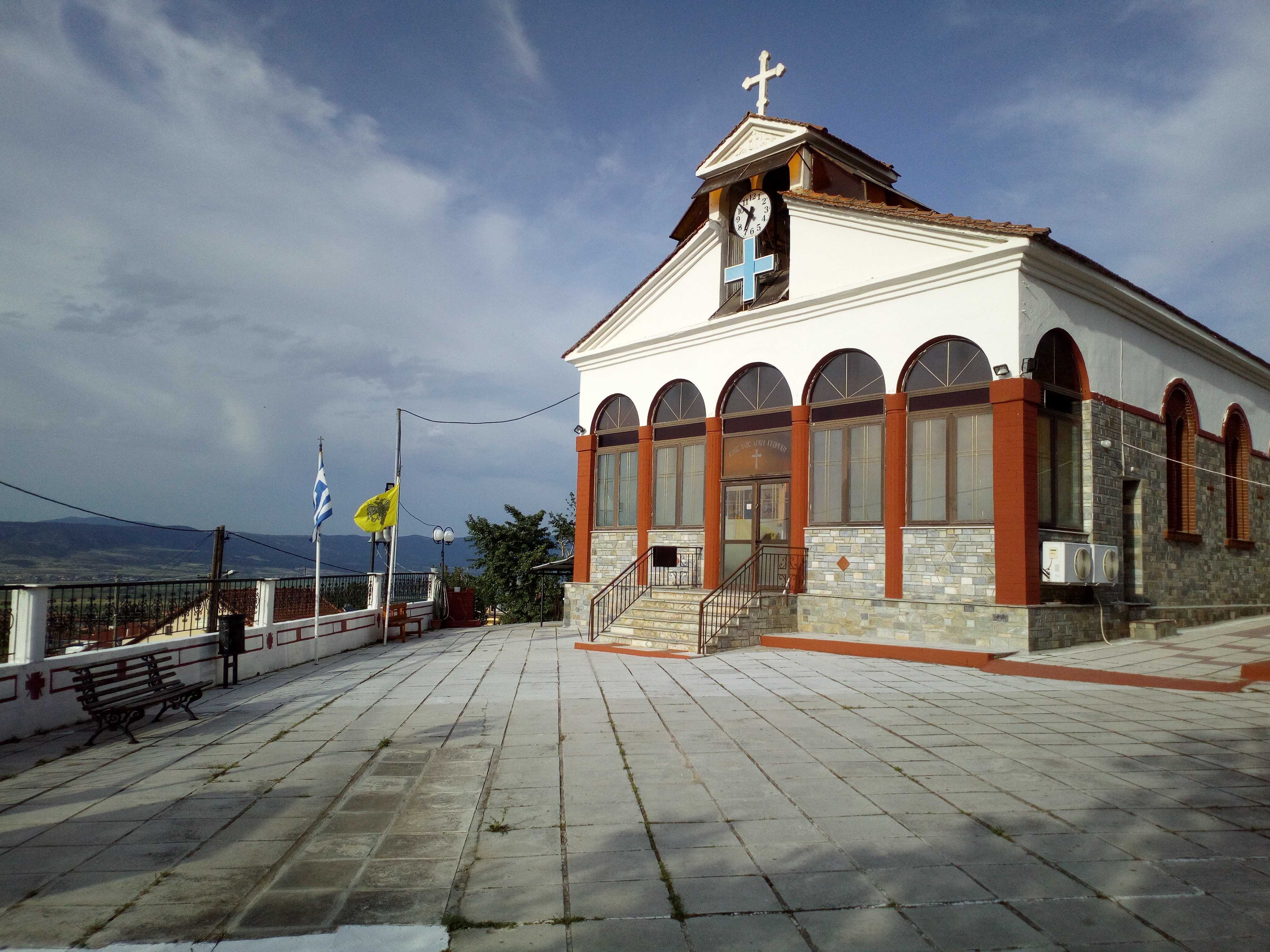 DS1 20180429 182549